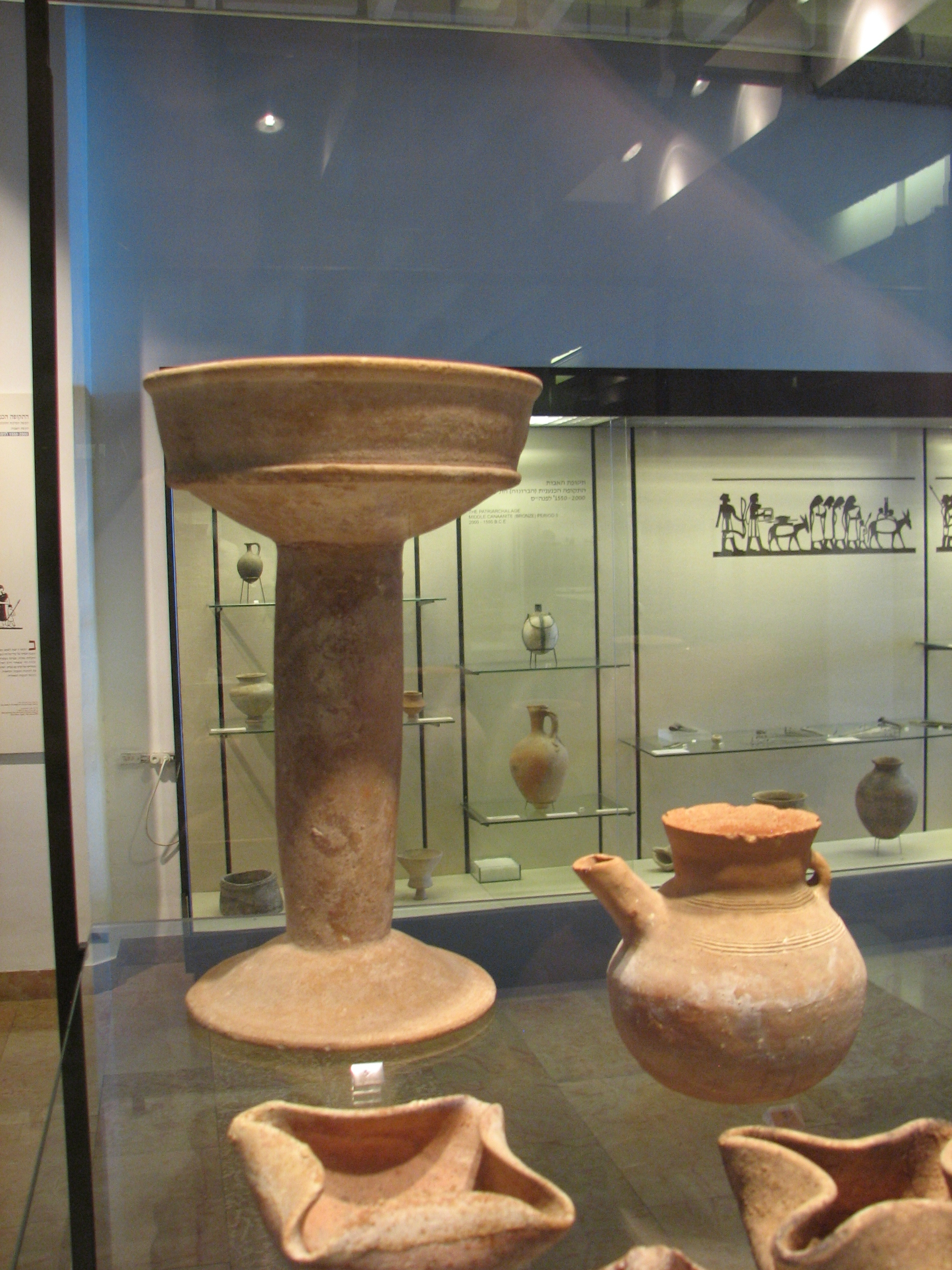 Intermediate Bronze Age Pottery in Hecht Museum כלים מתקופת הברונזה הביניימית במוזיאון הכט באוניברסיטת חיפה 2300-2000 לפני הספירה קובעת מאחור, נר שמן בעל ארבע פינות בחזית משמאל, קומקום מימין